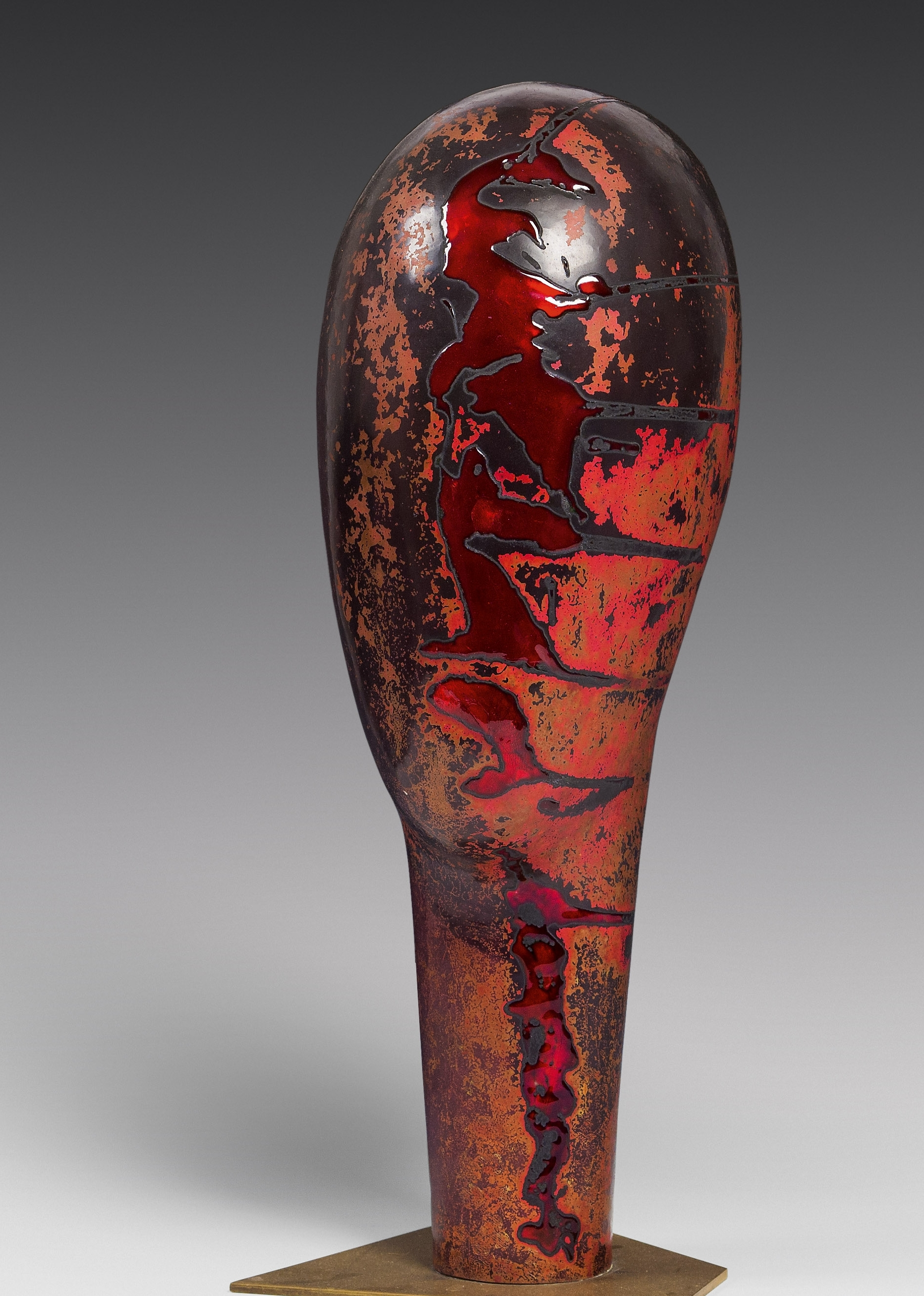 Kupfer-Email-Skulptur von Franz Hagenauer, ca. 1975.